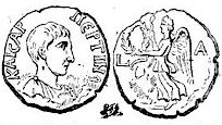 KAICAP ΠEPTIN. Son buste nu, drapé à droite. L. A. Victoire marchant à gauche, tenant des deux mains une grande couronne. Frappée à Alexandrie.